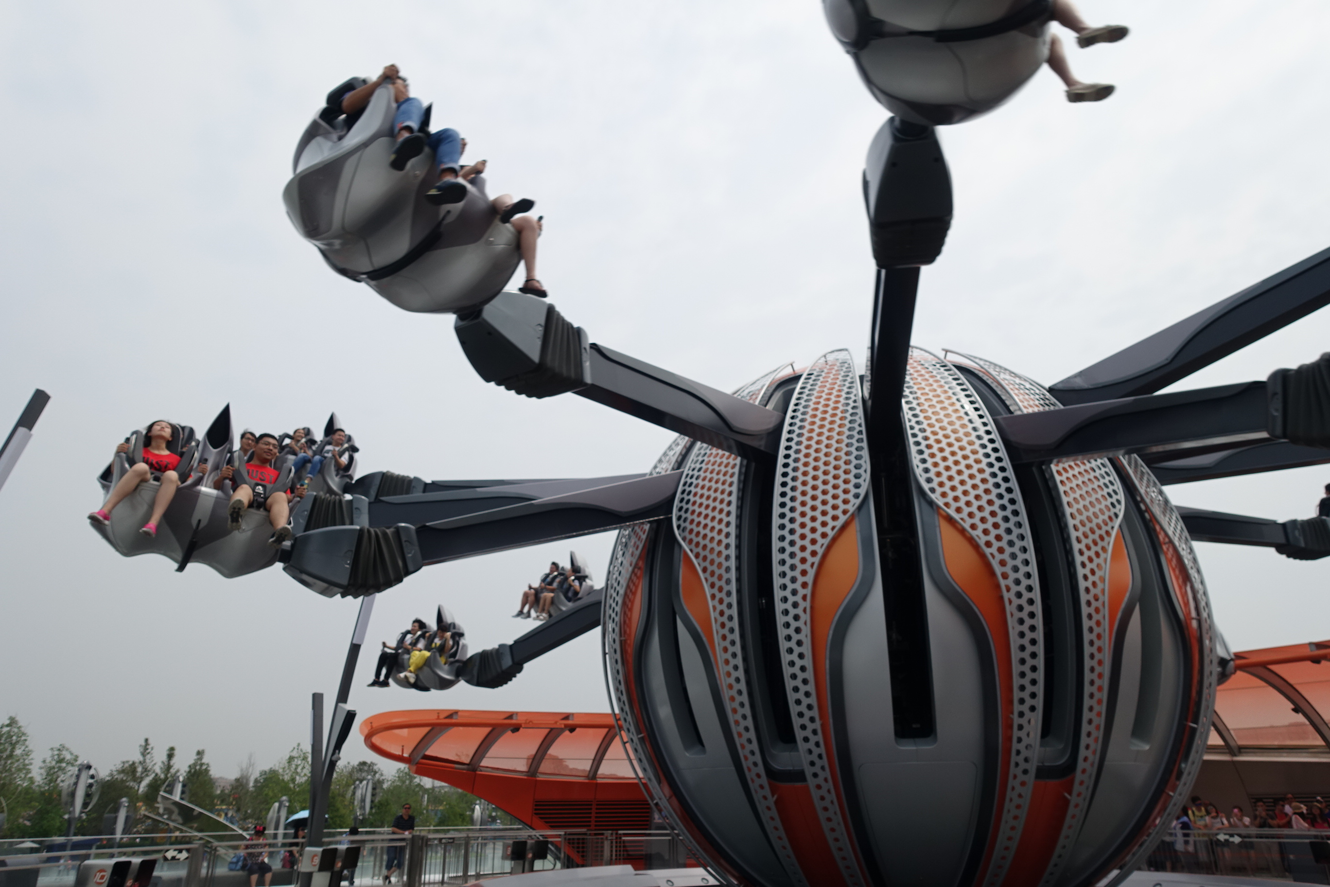 Jet Packs